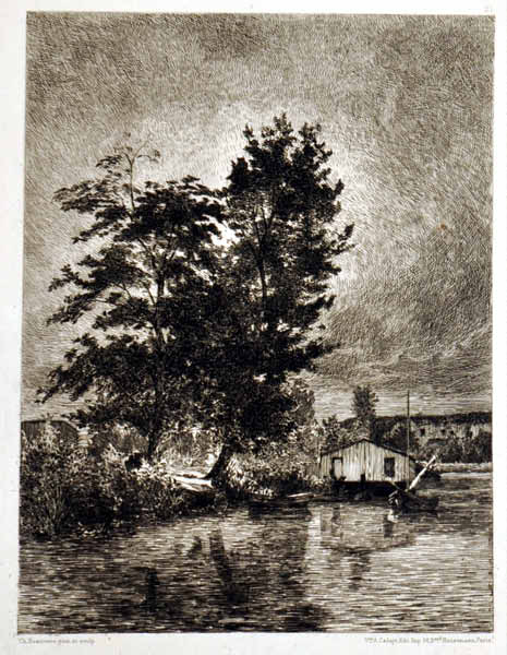 Auvers-sur-Oise (Bâteau lavoir à Auvers) Radierung, 28 x 20 cm